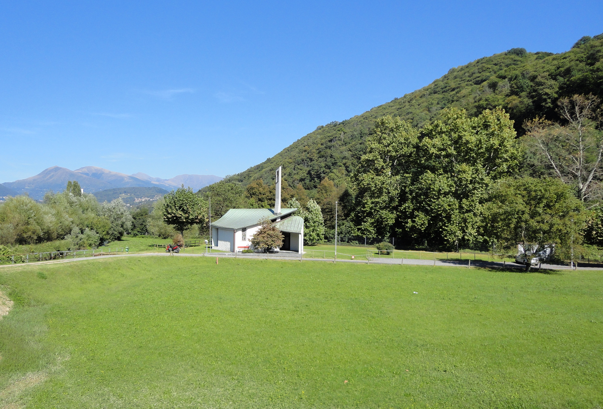 Oratorio della Madonna dei Mulini - Mulini di Bioggio